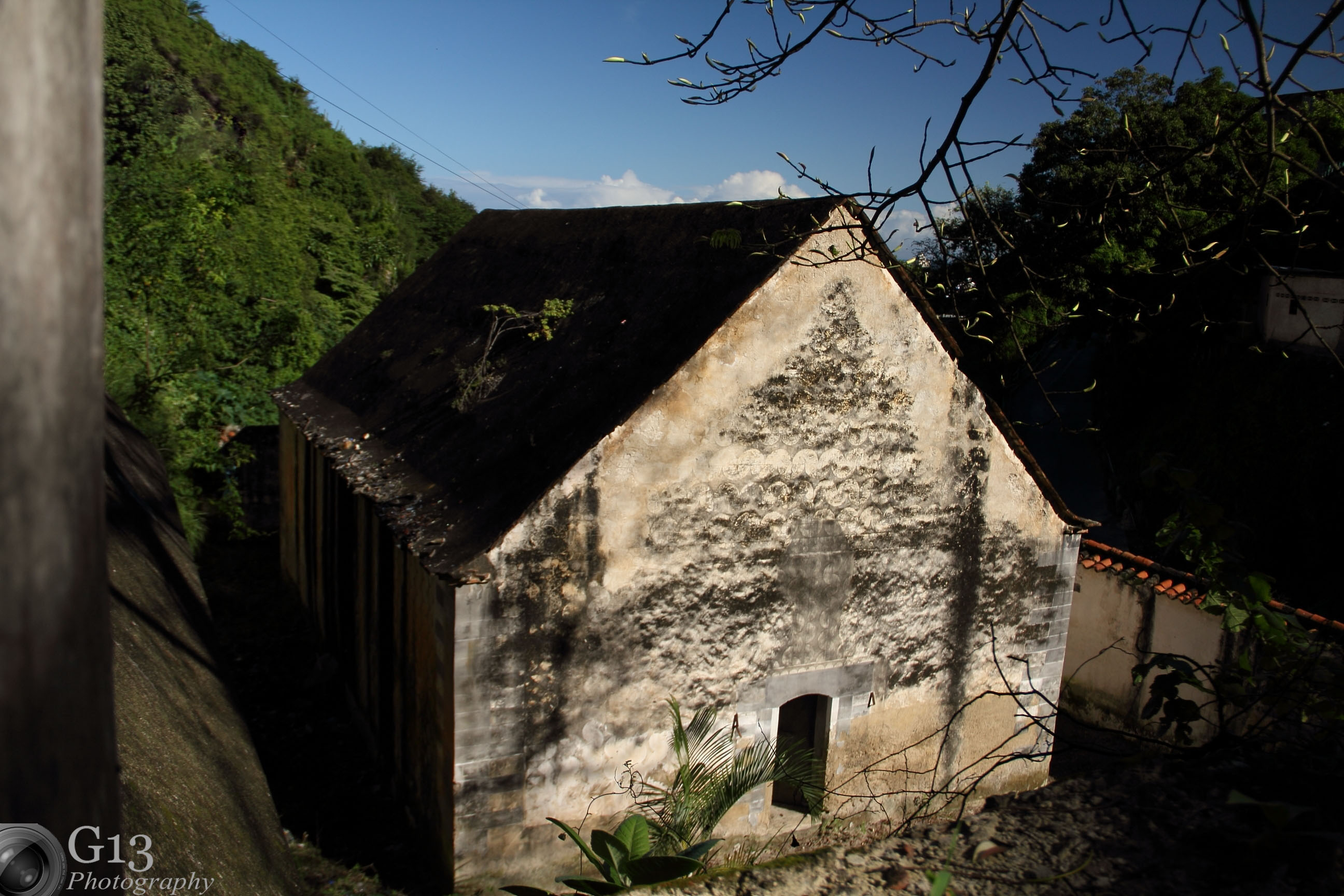 La Guaira Venezuela